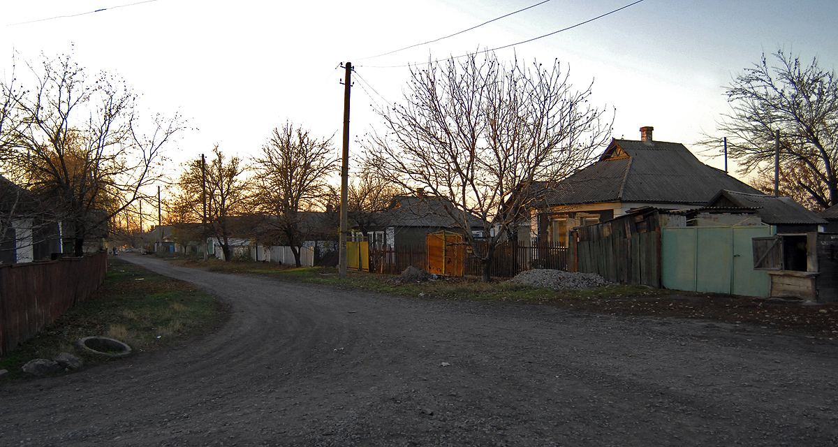 Улица 1-мая, село Сигнальное, Донецкая область, Украина ( 1-may street)